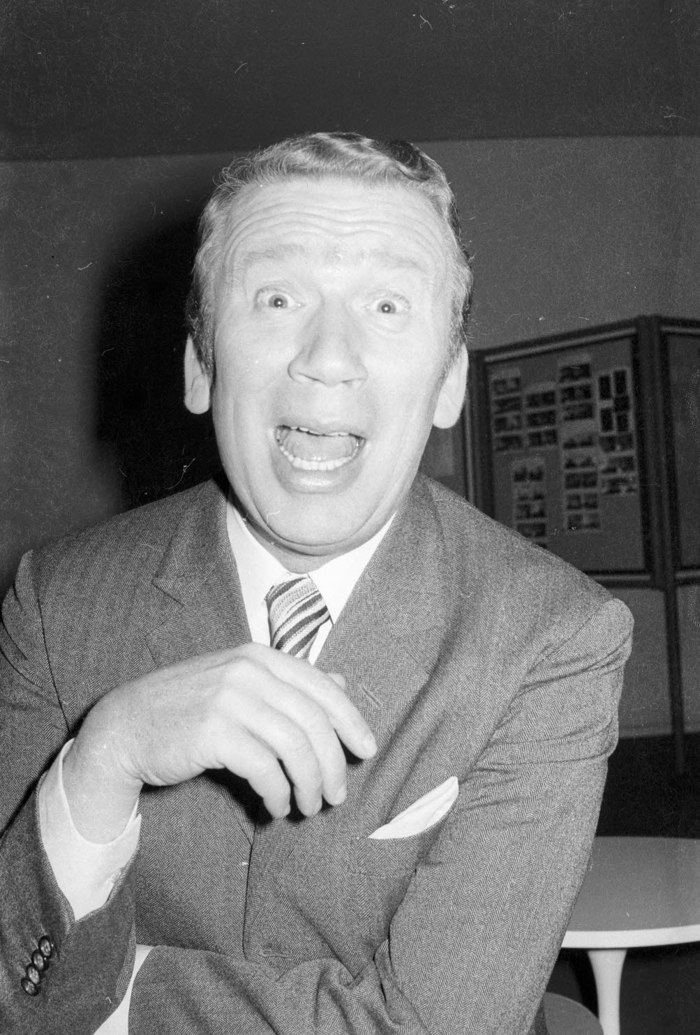 Dieses Foto erschien auf der Titelseite der Sonderausgabe, die die Kieler Nachrichten (KN) nur für den Schauspieler herstellten.